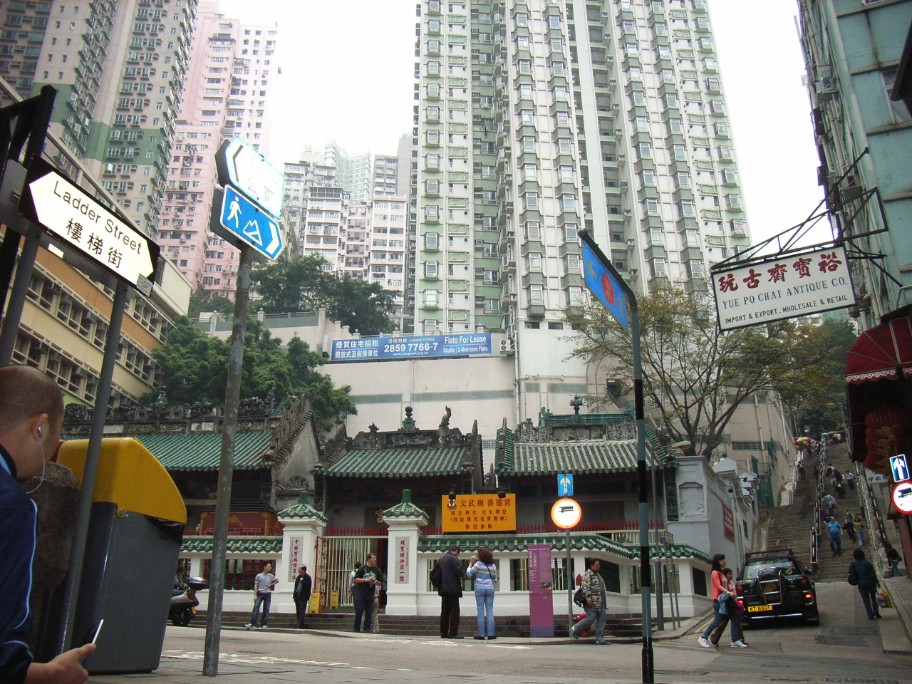 樓梯街位於zh:香港zh:香港島zh:上環zh:嚤囉街zh:荷李活道附近zh:文武廟之西面 Sheung Wan, Hong Kong